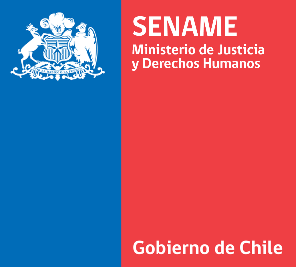 Logo Institucional del Servicio Nacional de Menores.